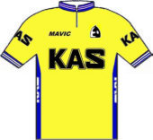 *permission : licence utilisée avec la permission du site concerné, envoyé par mail à permissions AT